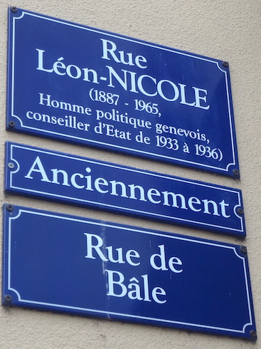 Rue Léon Nicole dans le quartier des Les Pâquis à Genève.